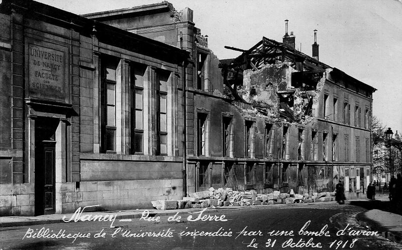 Dans la nuit du 31 octobre au 1er novembre 1918, la bibliothèque universitaire subit de nombreux dégâts suite à un bombardement de Nancy